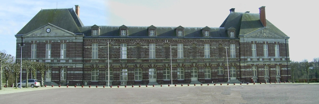 Chateau et mairie de Torigni sur Vire, commune du département de La Manche, Normandie, France